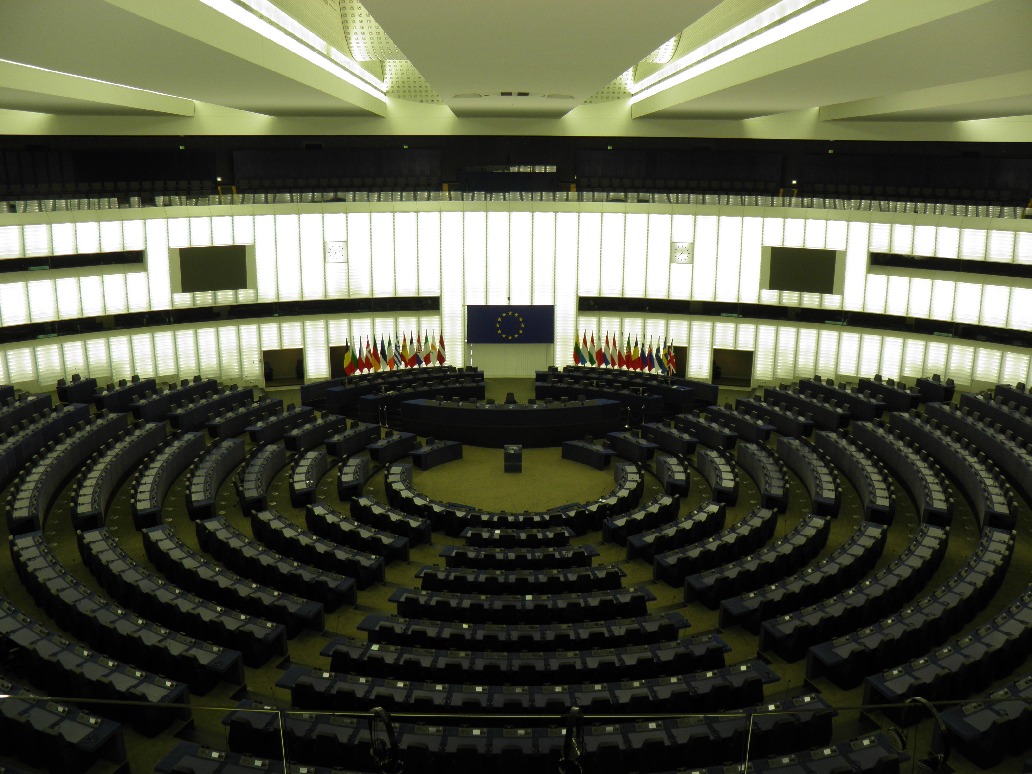 Hémicycle du Parlement européen à Strasbourg (Bas-Rhin, France).